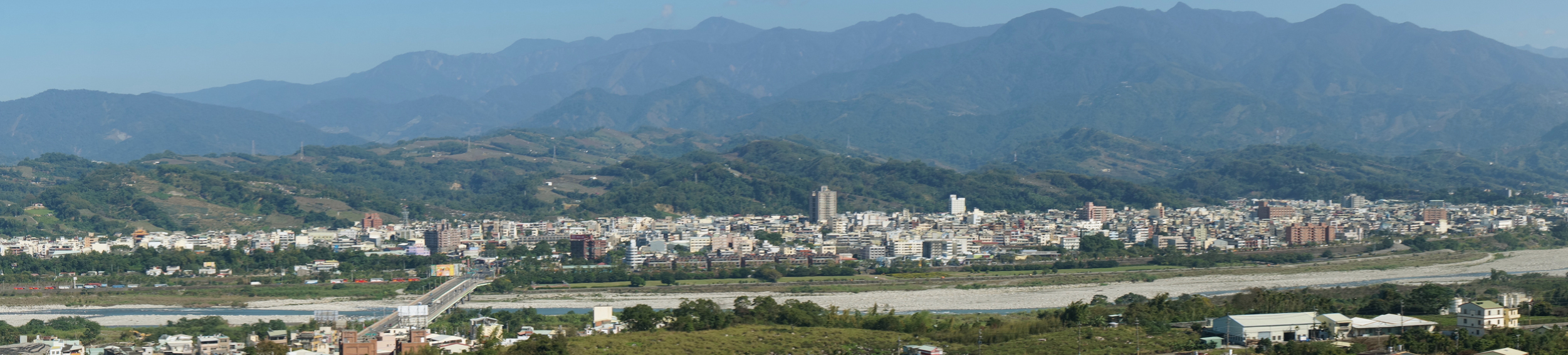 中文（台灣）: 東勢市區全景